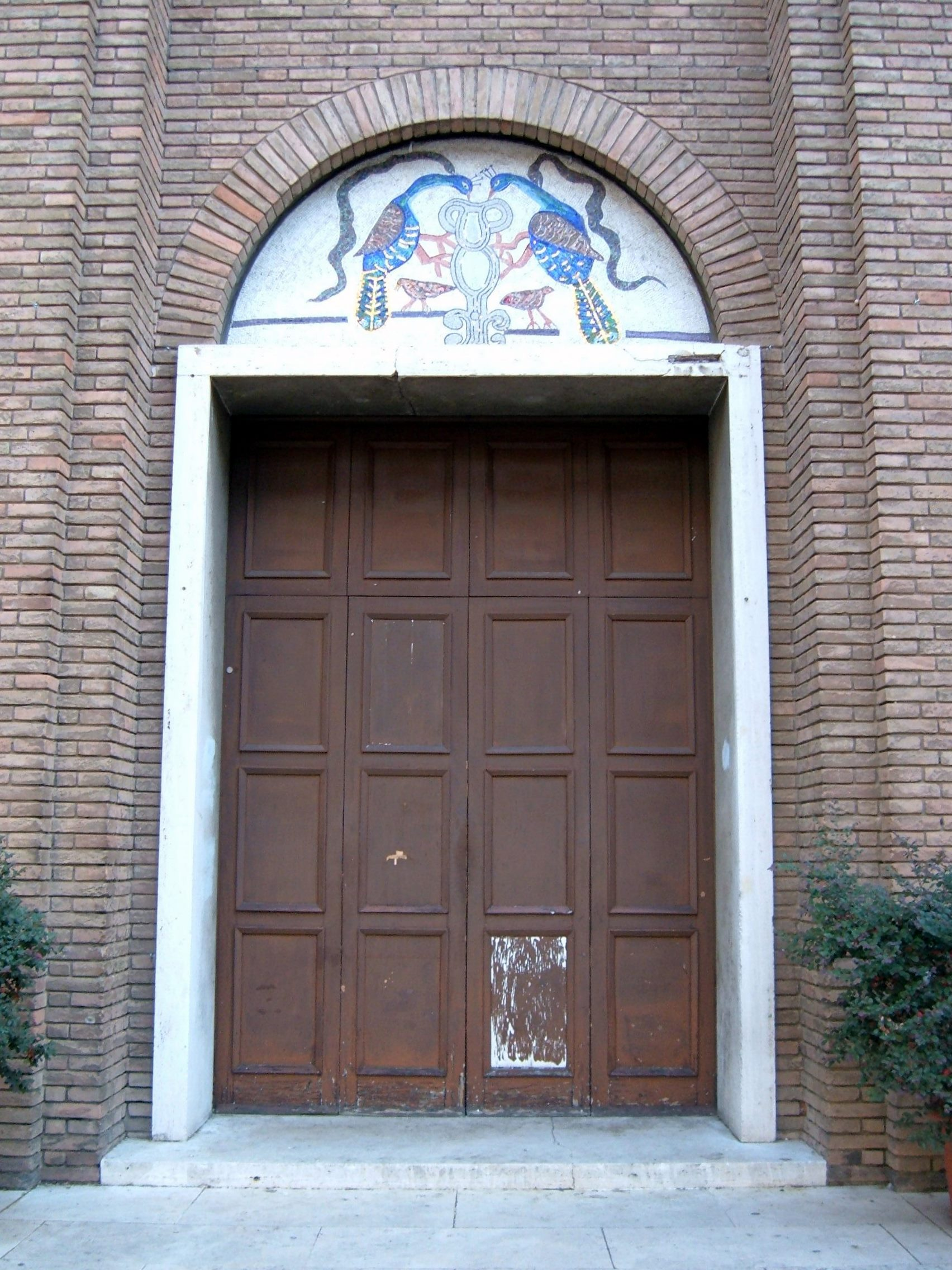 Chiesa di Santa Galla, a Roma, nel quartiere Ostiense, in circonvallazione Ostiense.